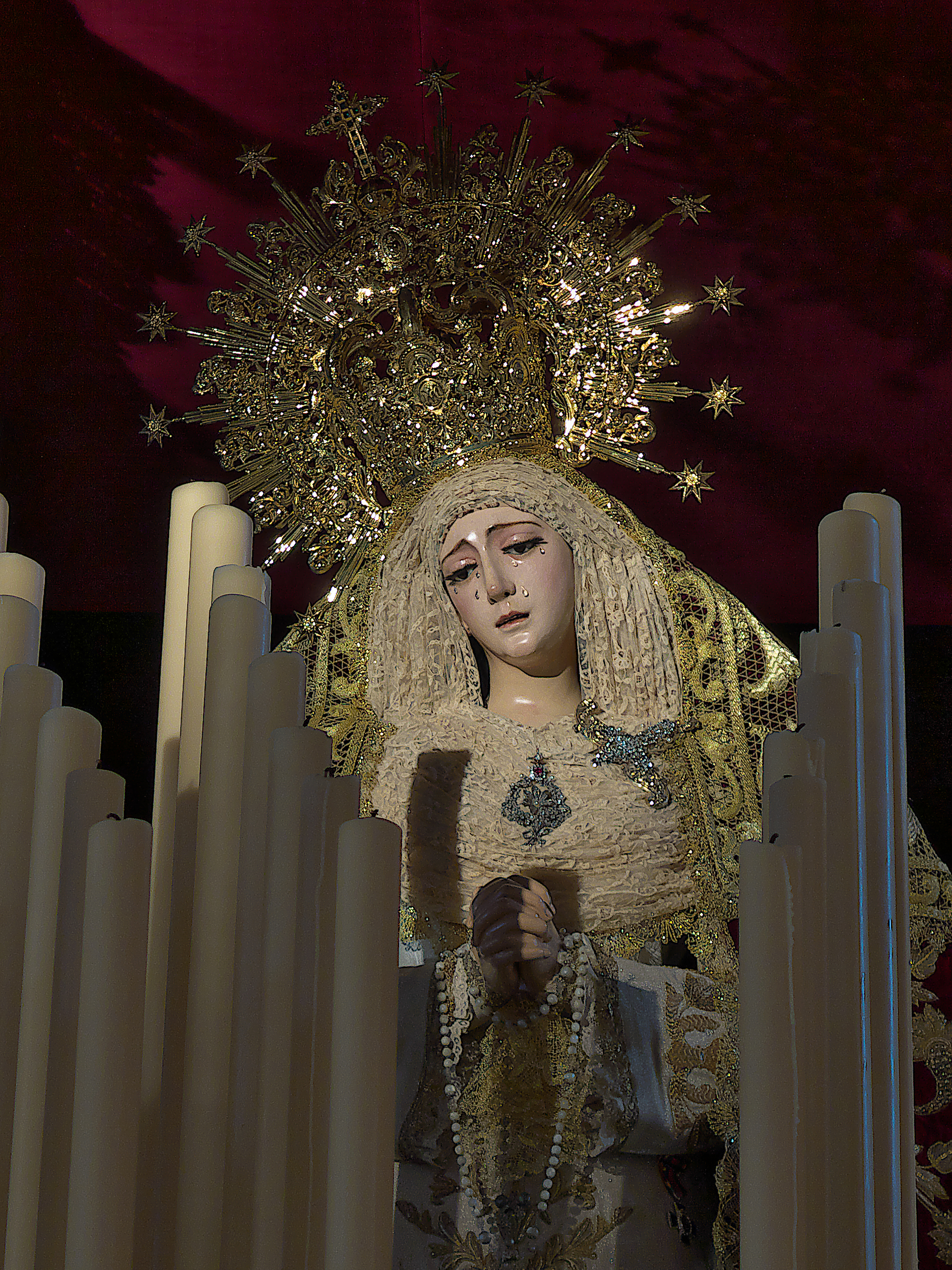 Hermandad de la Amargura (Carmona), Iglesia de San Felipe (Carmona). Imaginero, Benito de Hita y Castillo (1762)